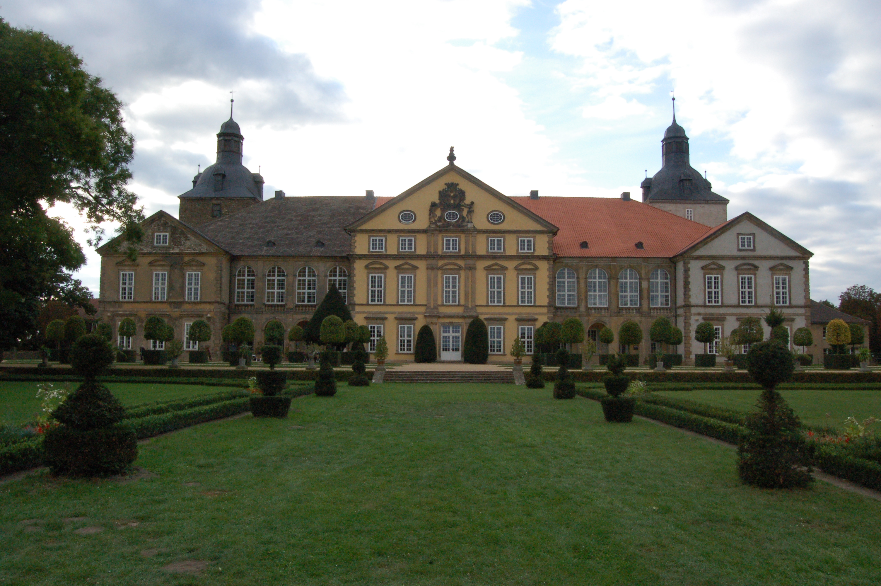 Schloss Hundisburg, Haldensleben, Blick vom Barockpark